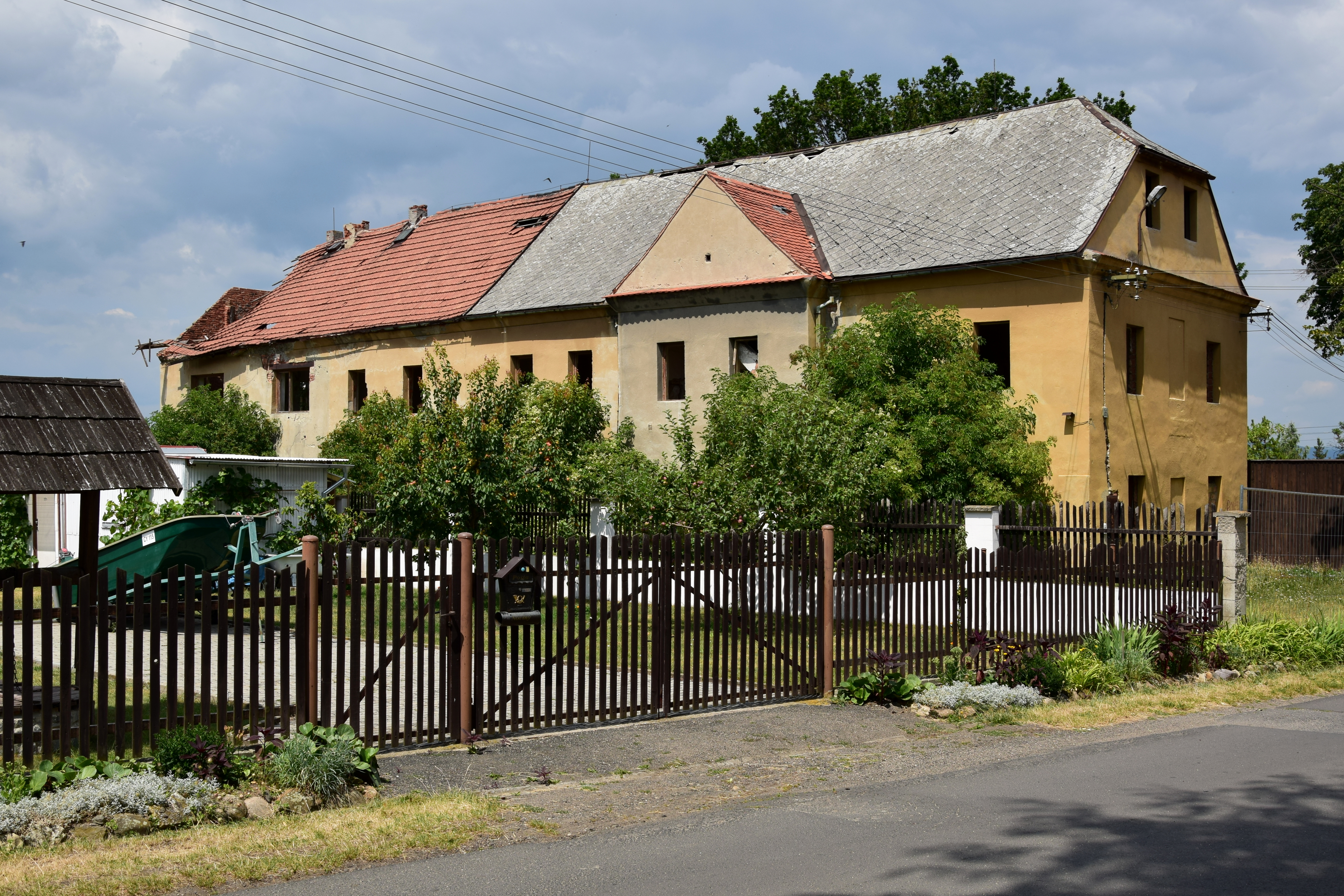 Vadkovice – opuštěné domy (vpravo dům čp. 1)